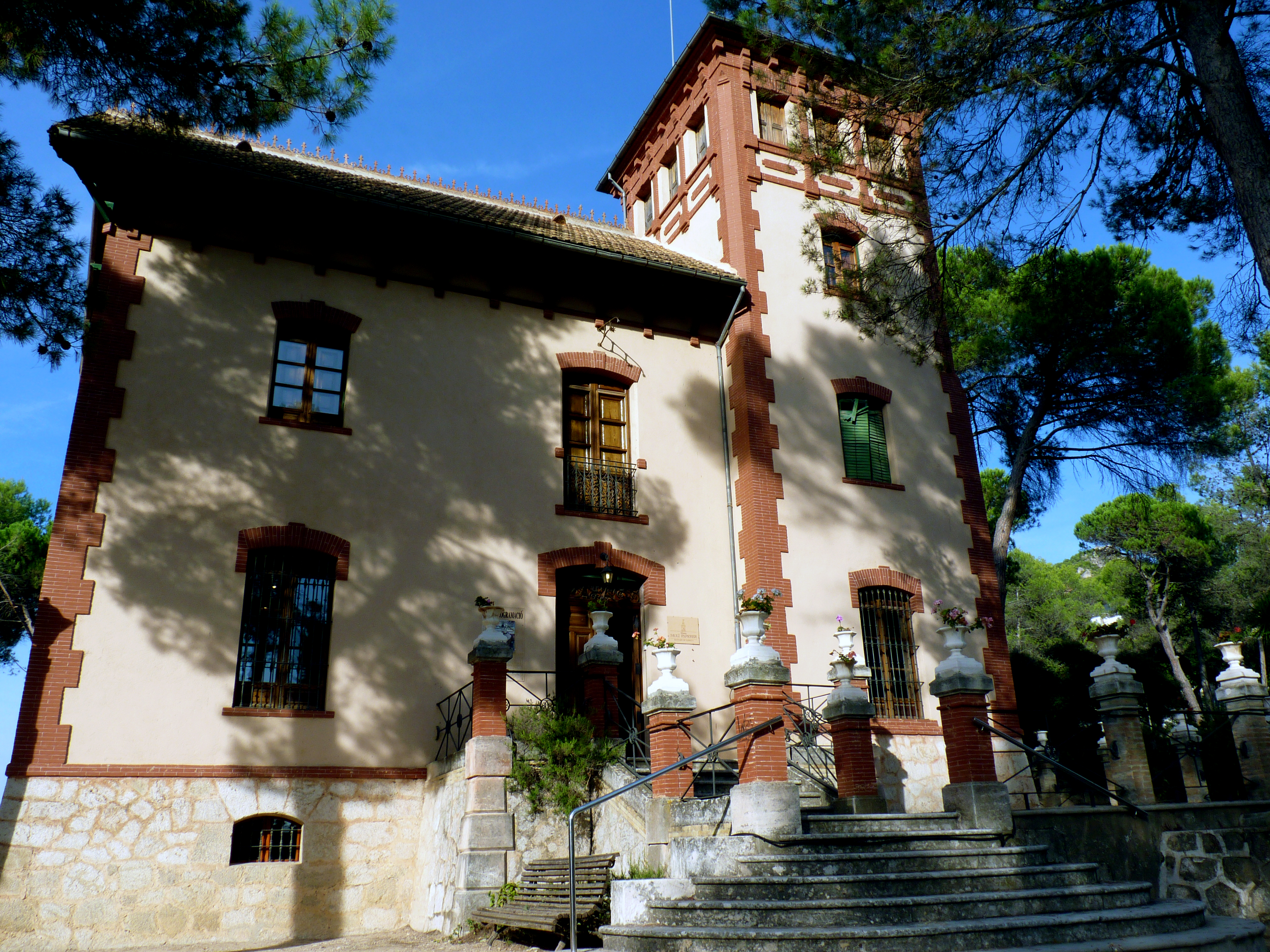 Vista frontal de l'edifici · Vista frontal del edificio